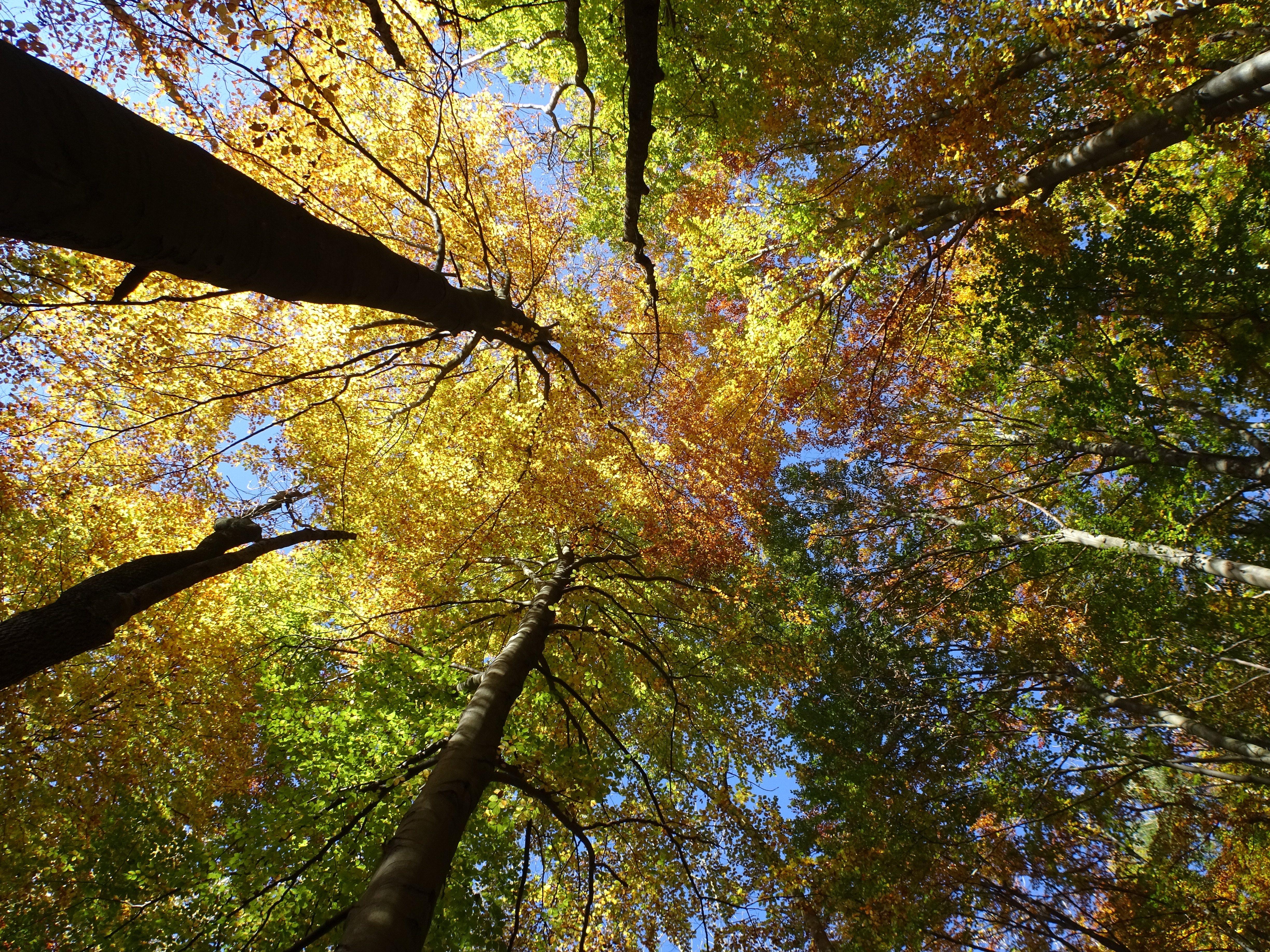 Das Naturschutzgebiet "Kalkklippen südlich des Iberges" liegt im Stadtgebiet von Bad Sooden-Allendorf im nordhessischen Werra-Meißner-Kreis. Es umfasst die großflächigen Waldgebiete an den Hängen des Iberges und Hesselkopfes, entlang der Landesgrenze zu Thüringen. Als Naturschutzgebiet mit der nationalen Nummer 636028 und dem WDPA-ID-Code 163985 wurde der Bereich mit einer Größe von 47,3 Hektar in 1995 ausgewiesen. Das Naturschutzgebiet wurde in 2008 in das insgesamt 289,2 Hektar große Fauna-Flora-Habitat-Gebiet "Kalkklippen der Gobert" Nr. 4726-350 integriert.